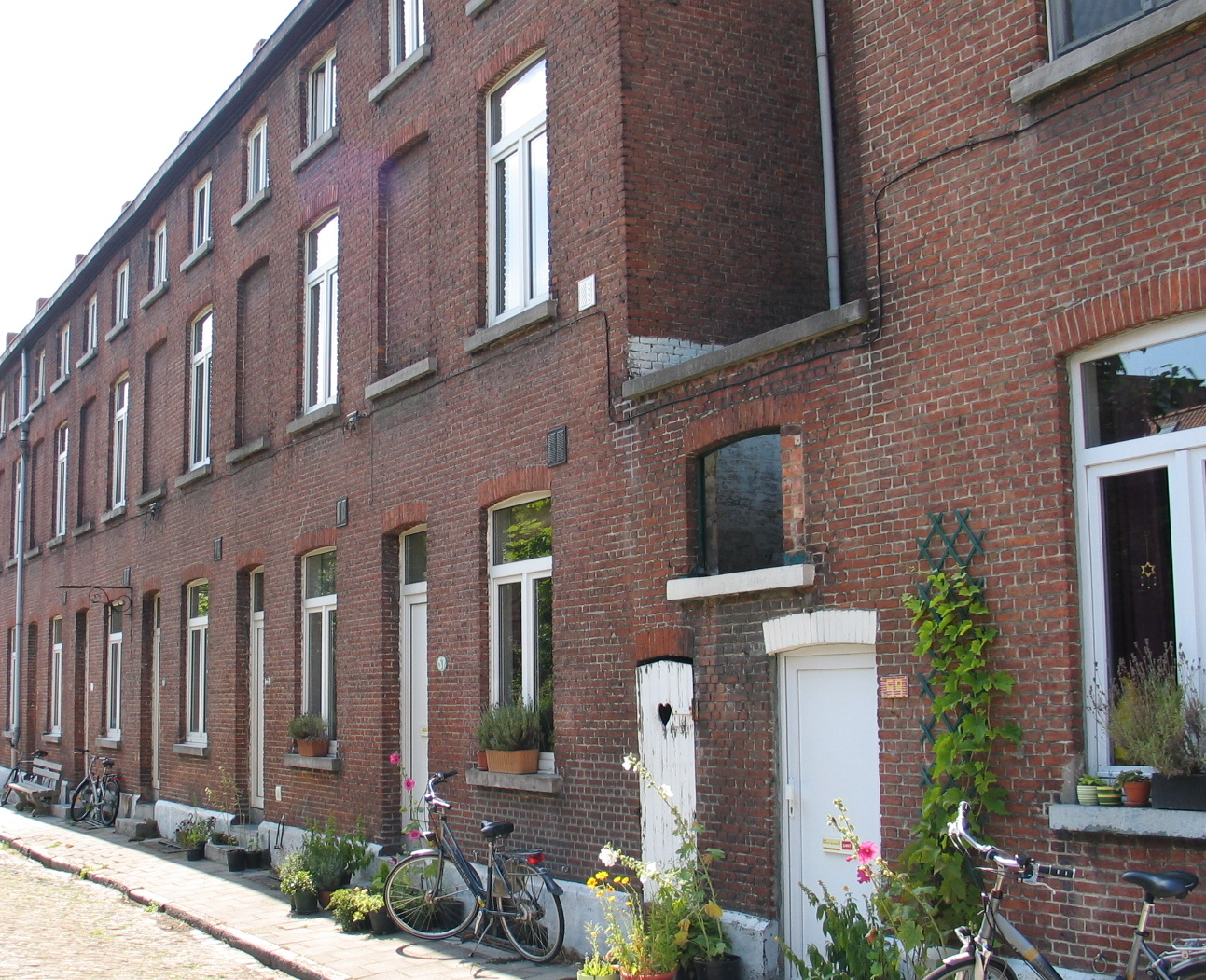 beluik (arbeiderswoningen) Cité Delacroix in Gent (België)